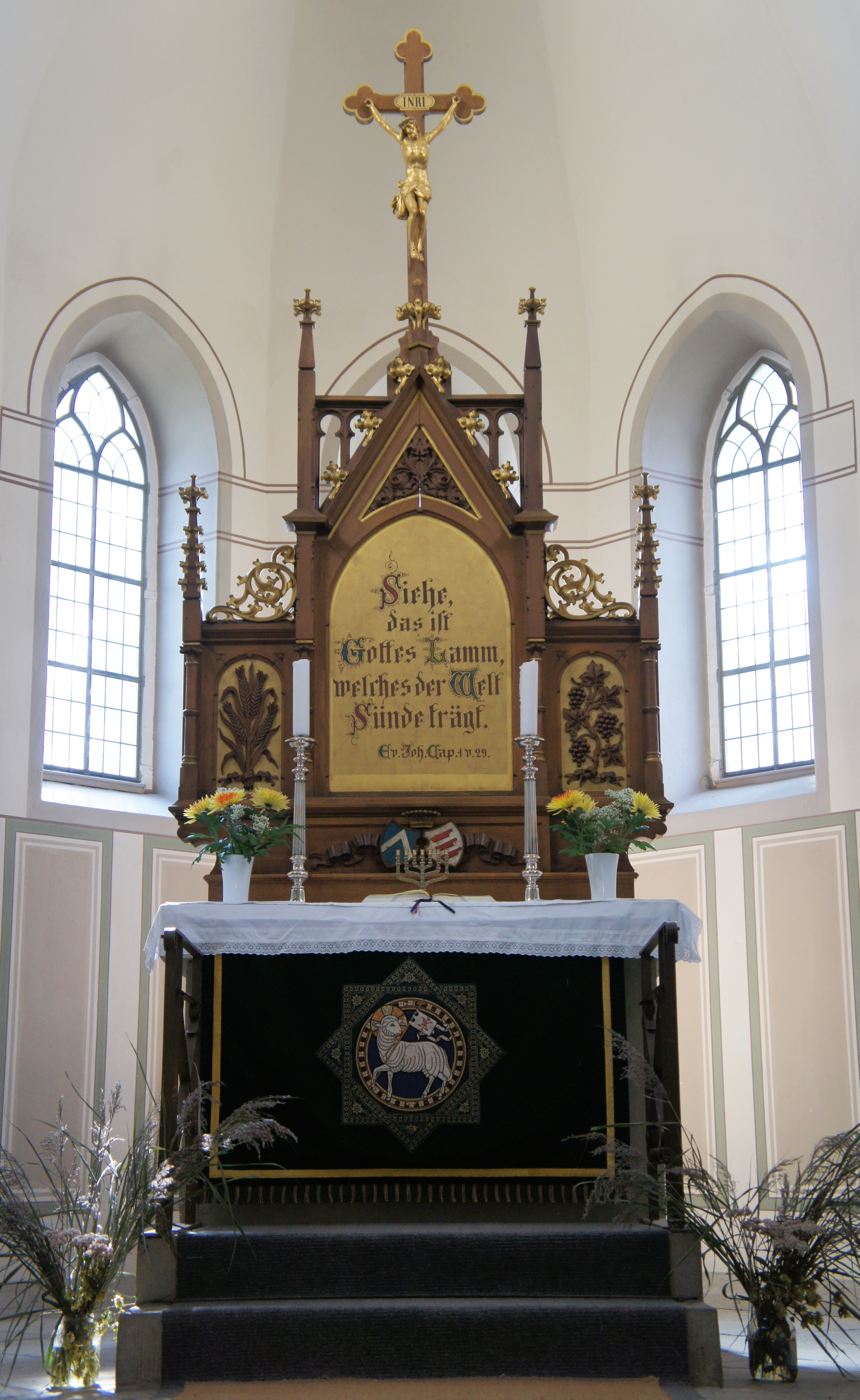 Kirche Ottendorf-Okrilla Die 1610 errichtete Kirche brannte 1873 infolge eines Blitzeinschlages ab, die neue Kirche wurde 1875 geweiht und 1995 saniert